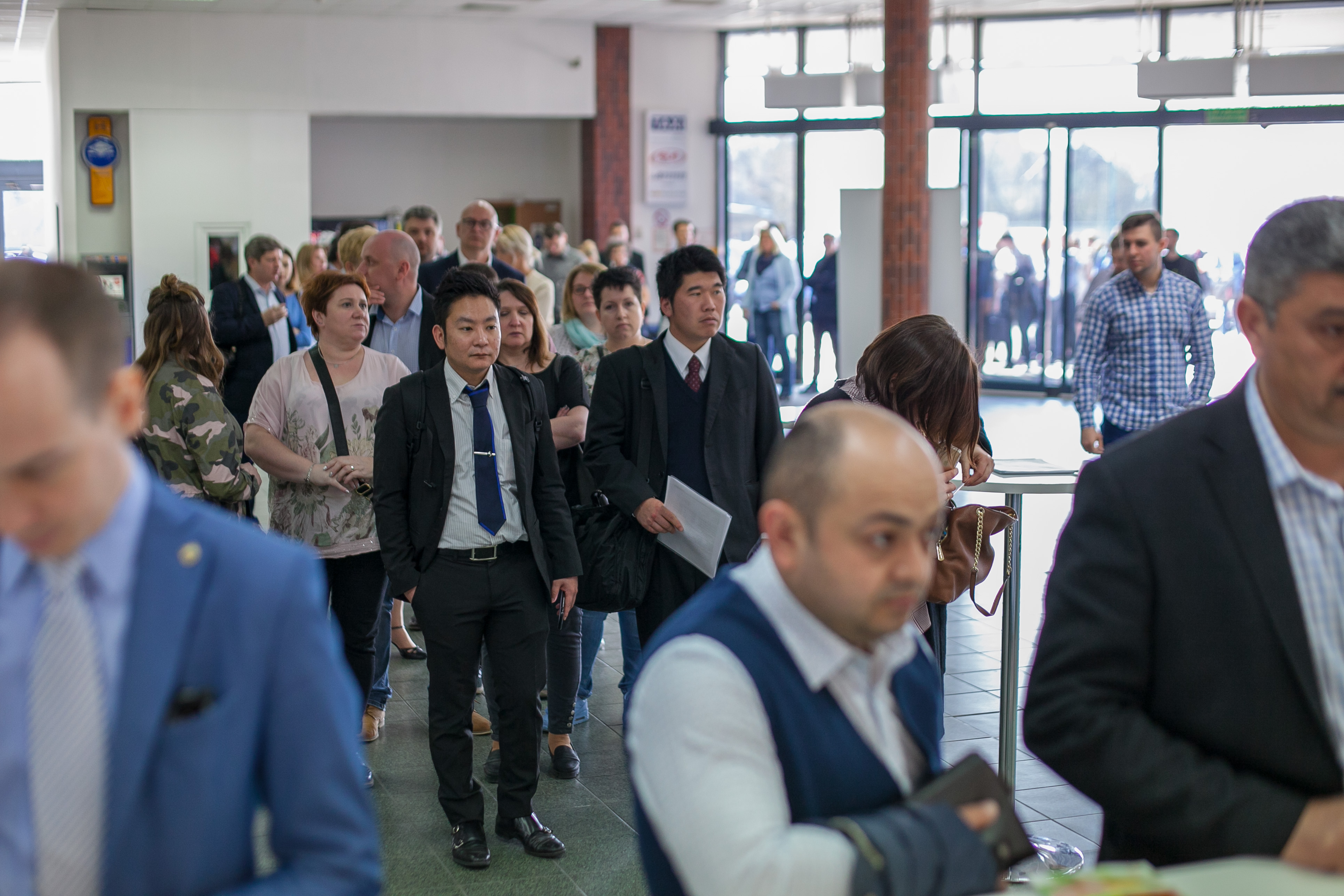 Odwiedzający WorldFood Poland